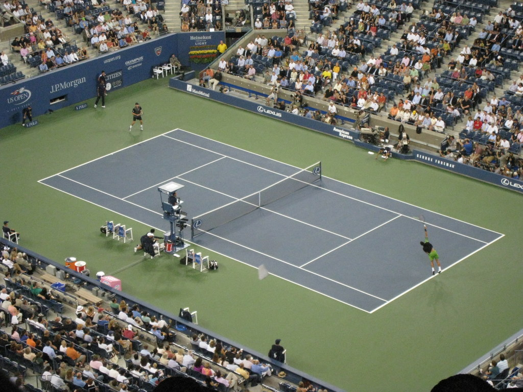 US Open 2008